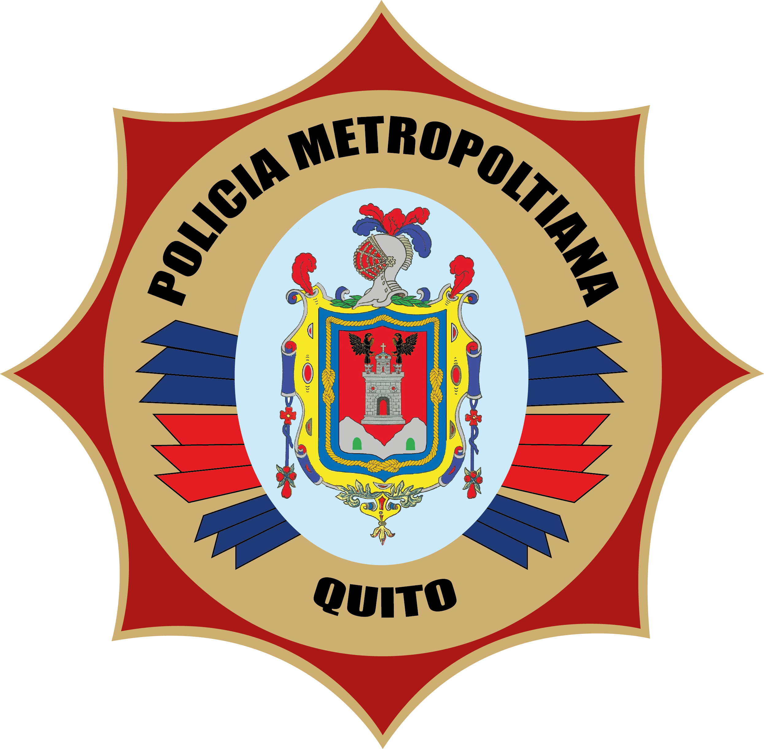 Escudo de la Policia Metropolitana de Quito